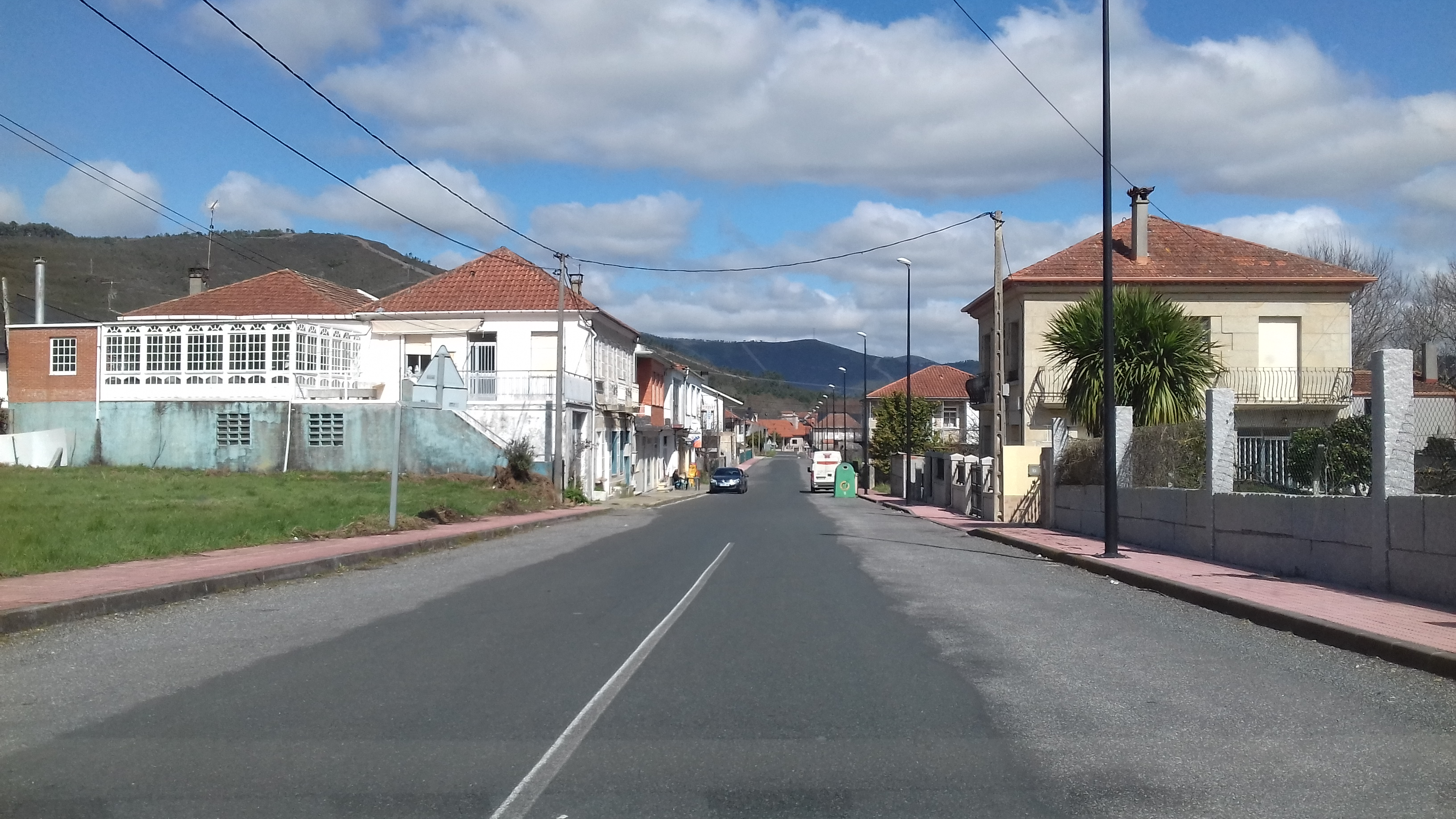 Feás, Boborás